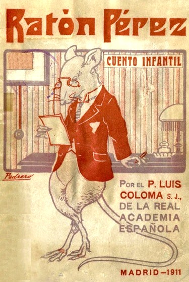 pg 1 del libro Raton Perez publicado en 1911